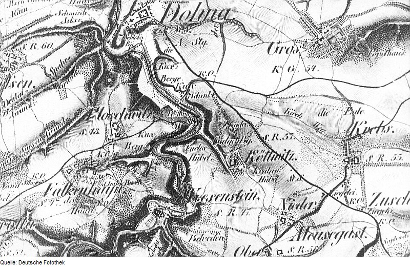 Original image description from the Deutsche Fotothek Dohna-Köttewitz. Oberreit, Sect. Dresden, 1821/22